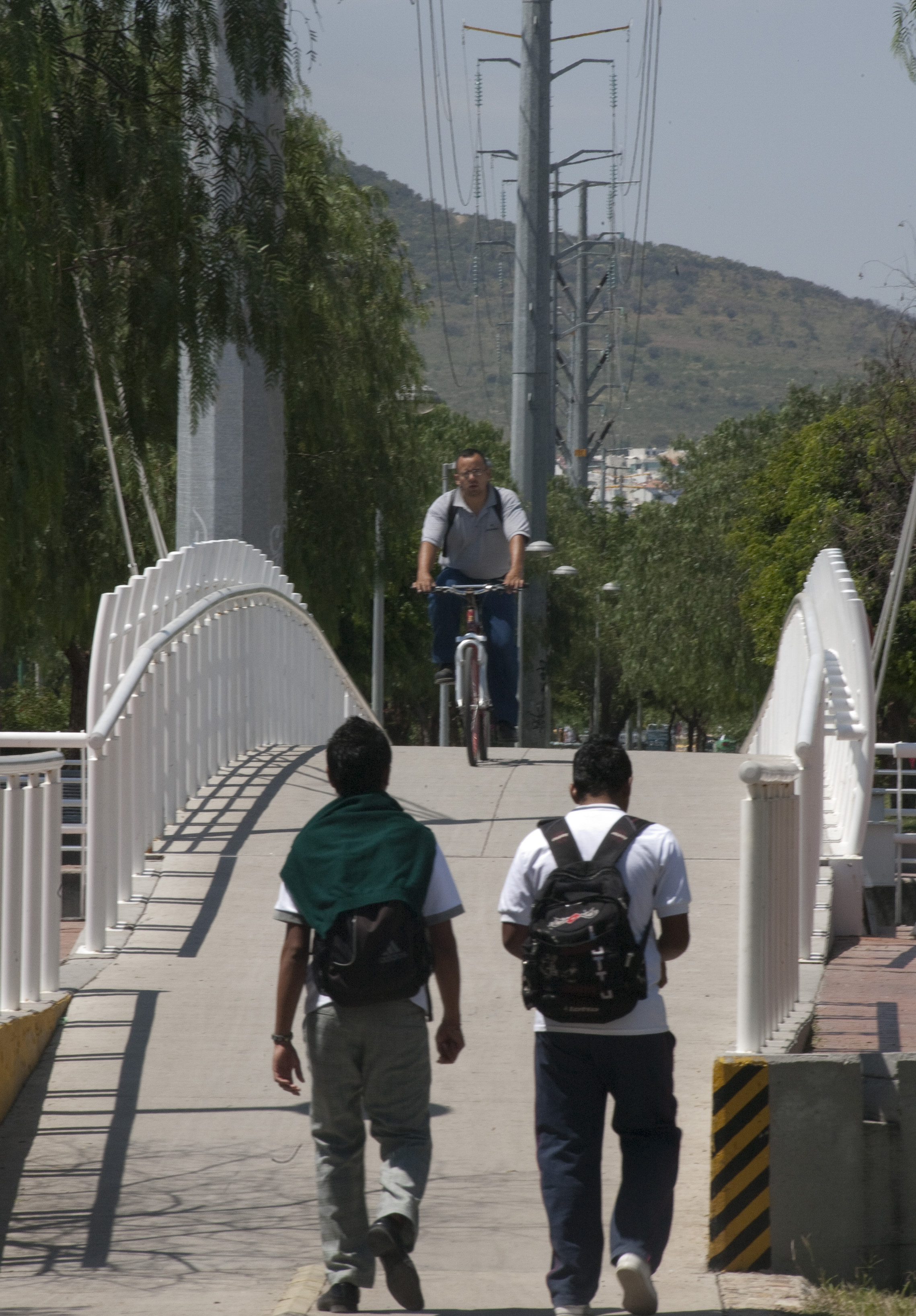 Ciclovias de la ciudad de León conforman un cicloférico .